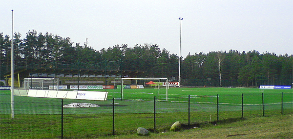 Hiiu Staadion/Hiiu Stadium